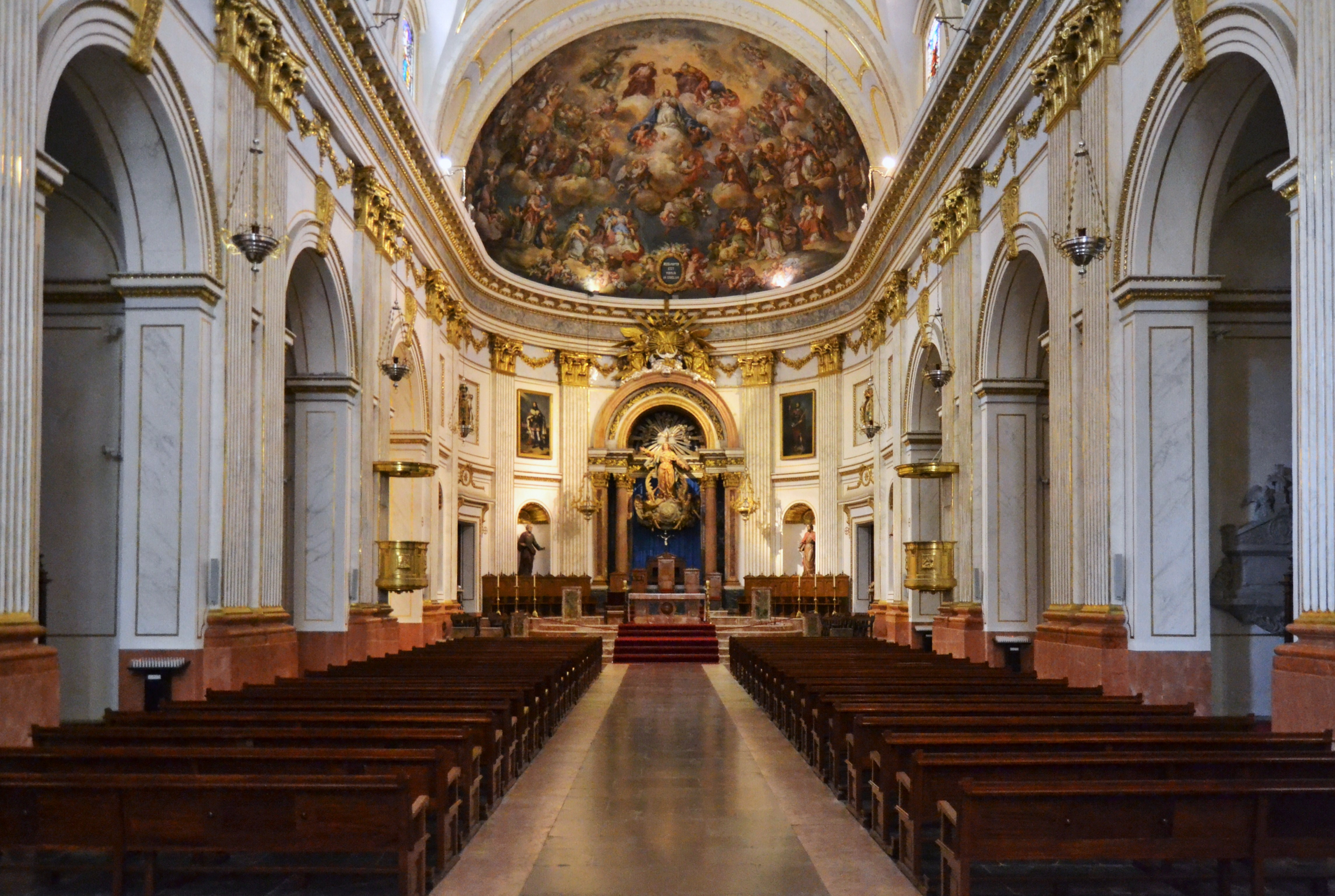 Alt Palància, interior de la catedral de Sogorb.